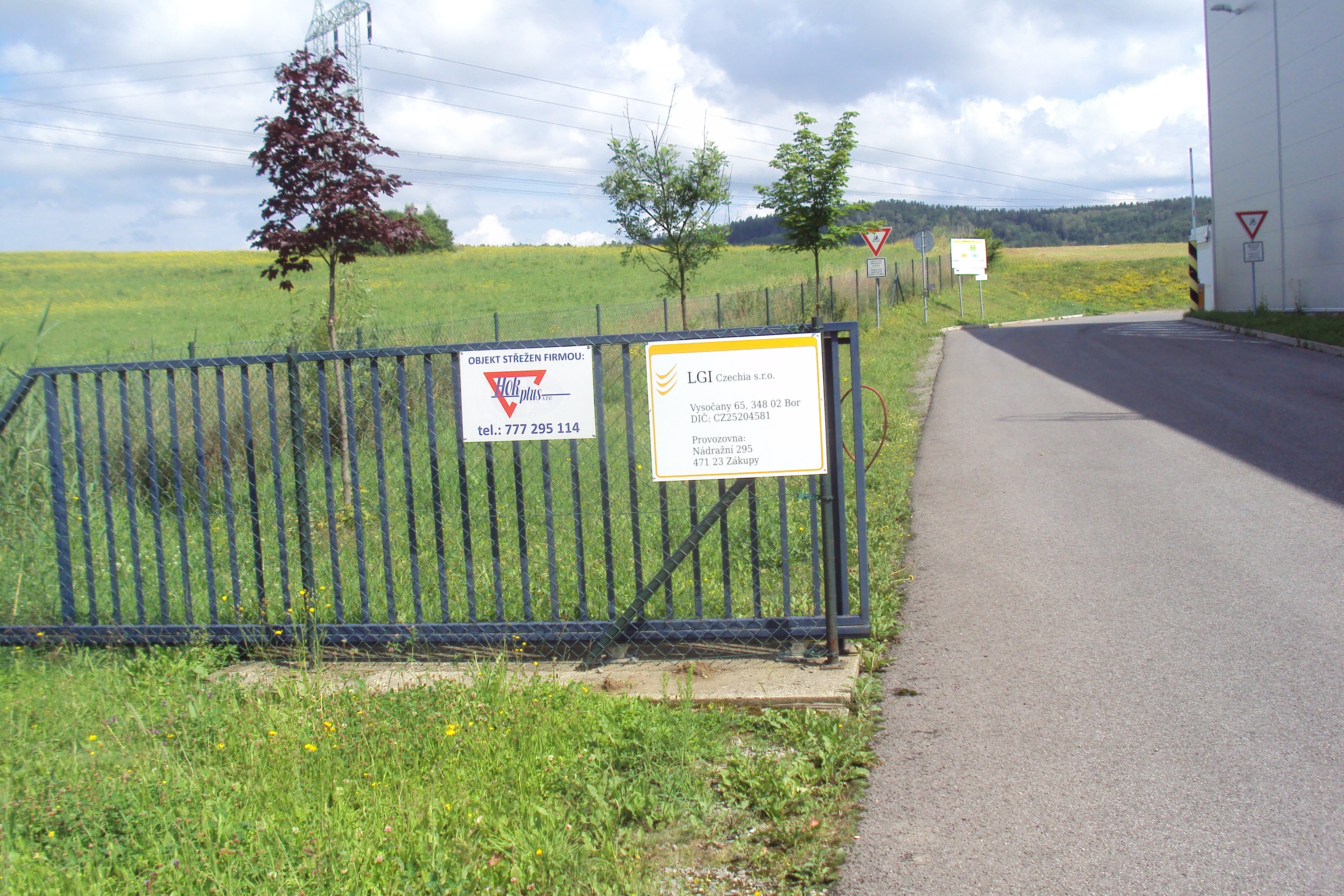 Firmu Willi Betz nahradila Zákupech firma jiná, ale se stejnou adresou